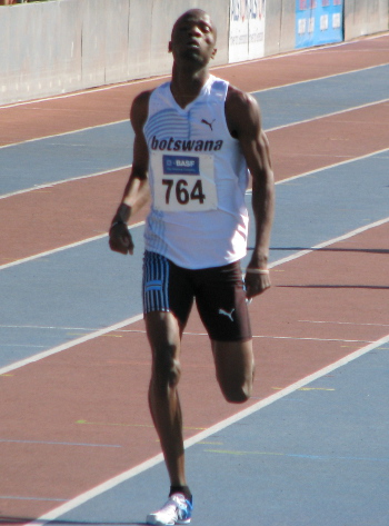 Nijel Amos im Ziel seines 1:43.11-800-Meter-Laufes beim Olympia-Qualifikationswettkampf 2012 im Stadion der MTG Mannheim.